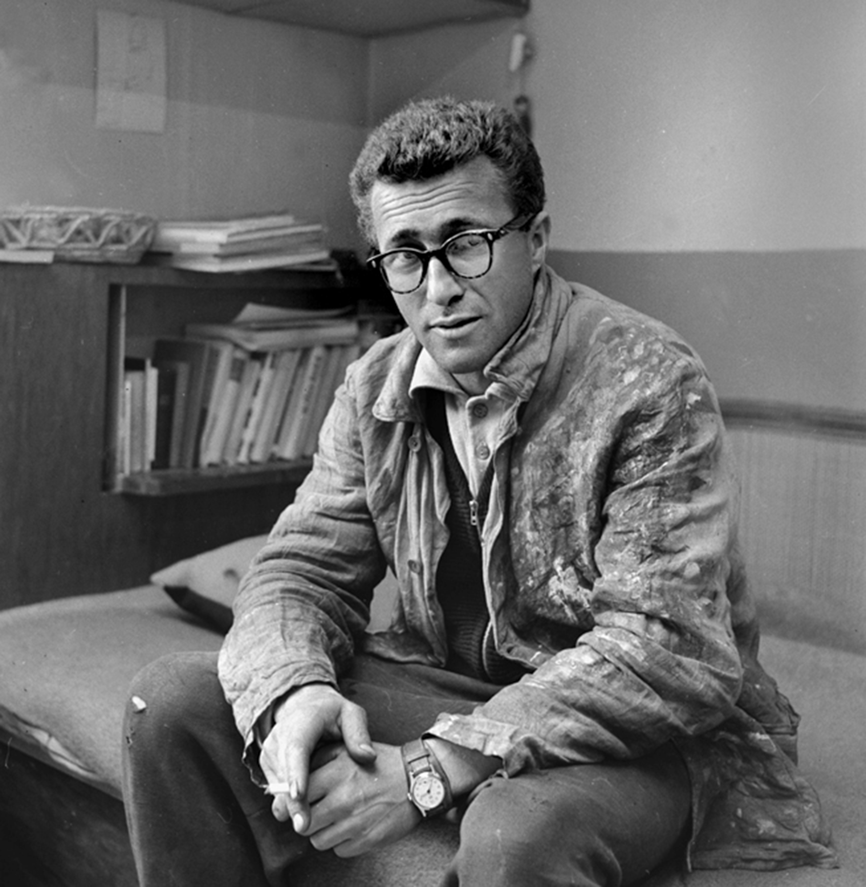 Jan Šplíchal, portrét Josefa Jíry